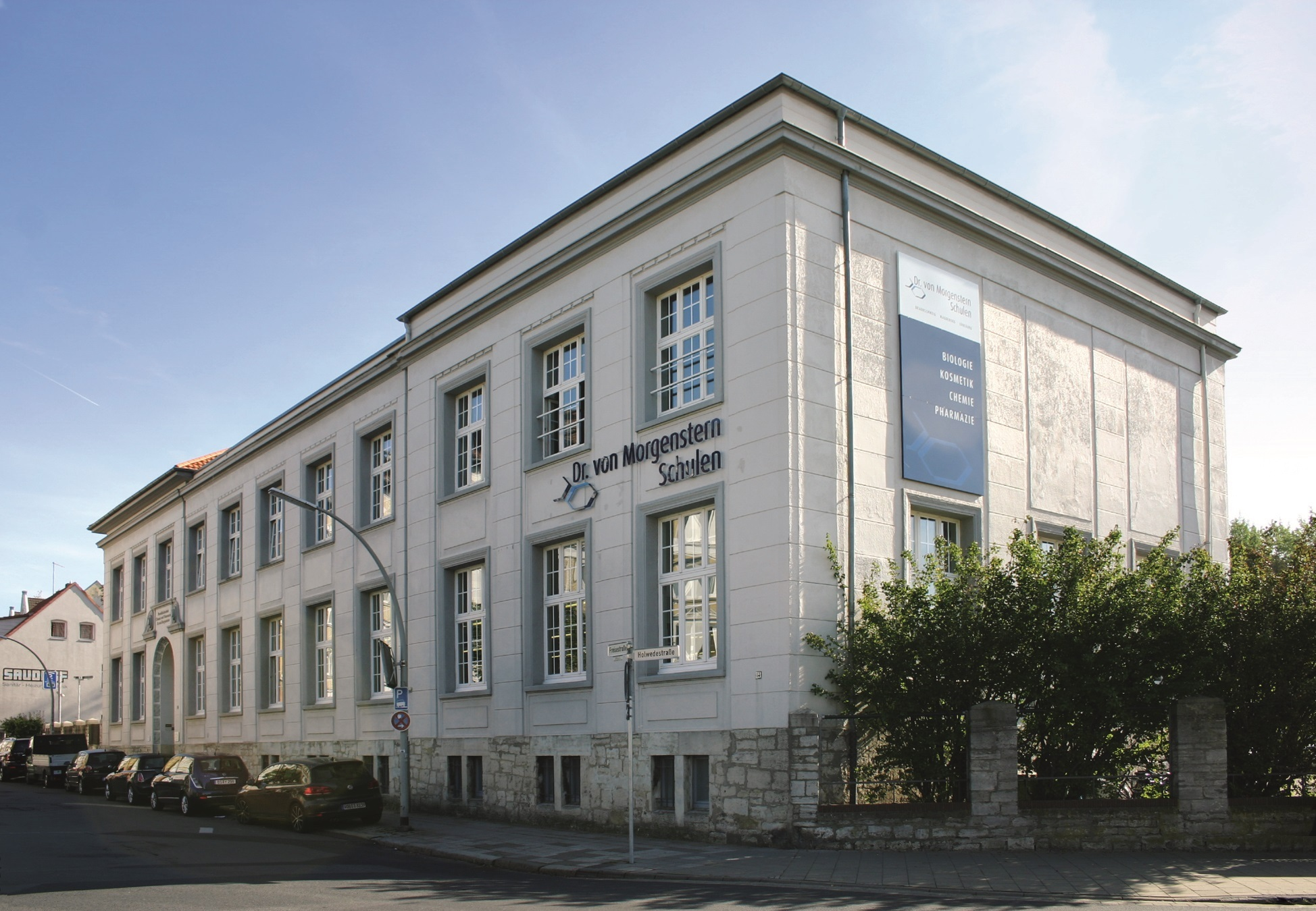 Das Bild zeigt das Schulgebäude der Dr. von Morgenstern Schulen am Standort Braunschweig.